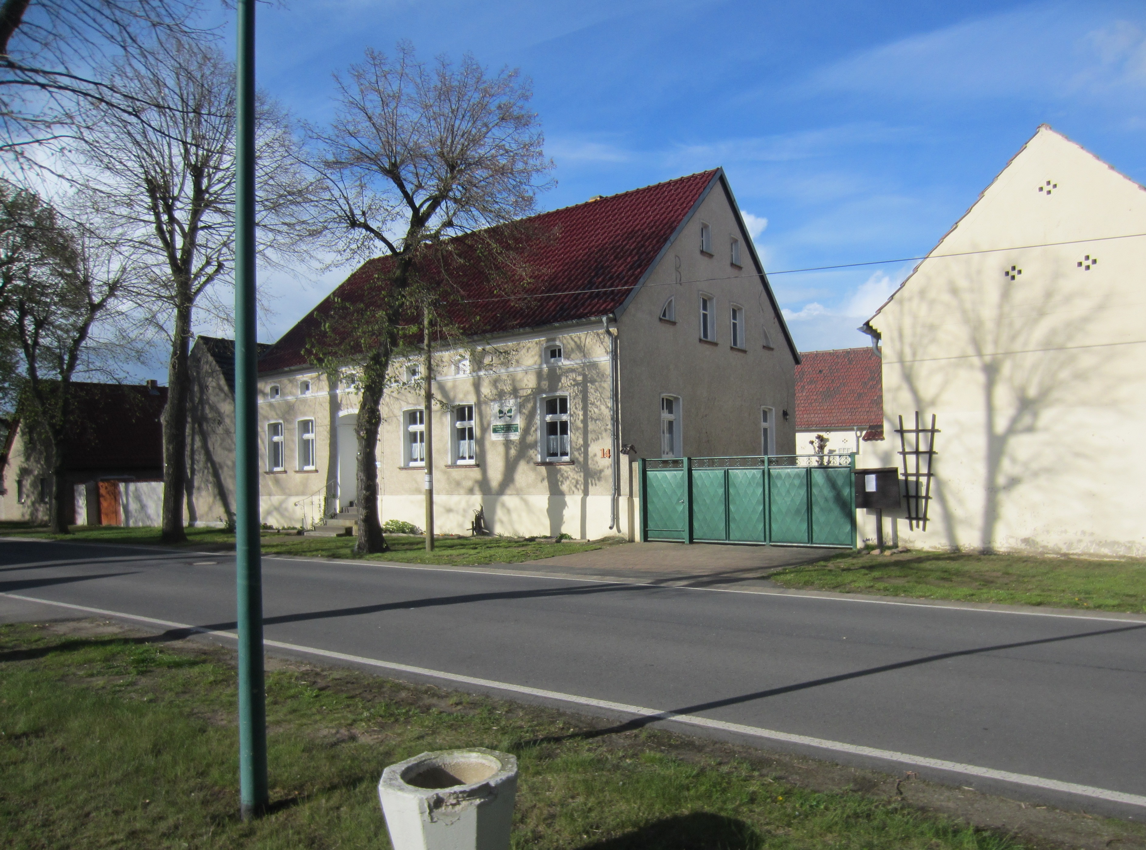 Falkenberg/Elster, Ortsteil Kleinrössen, Naturschutzzentrum, Ansicht von Südwesten